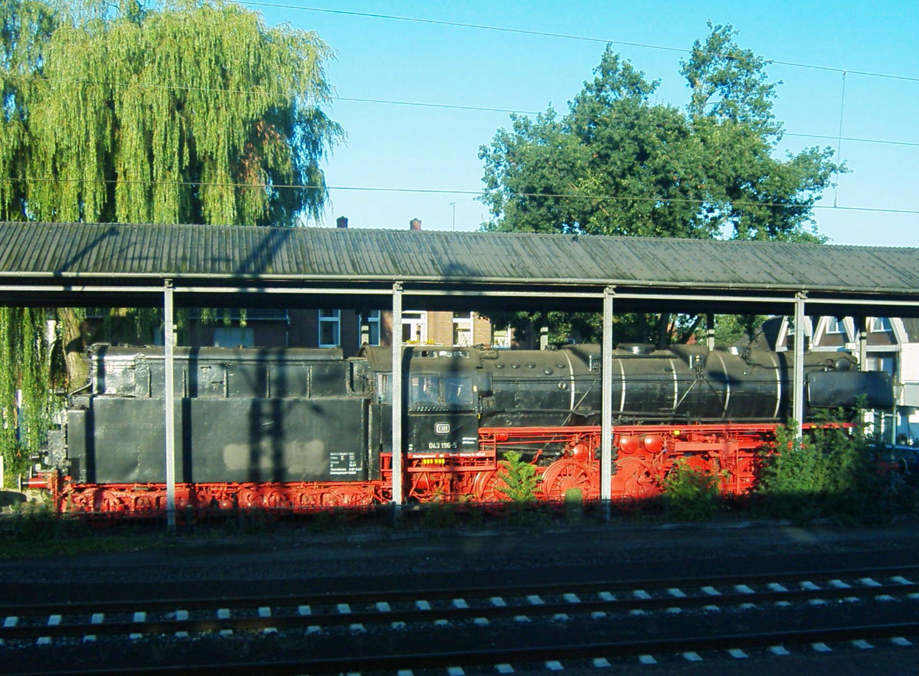 Letzte planmäßig verkehrende Dampflok Deutschlands am Bahnhof Salzbergen